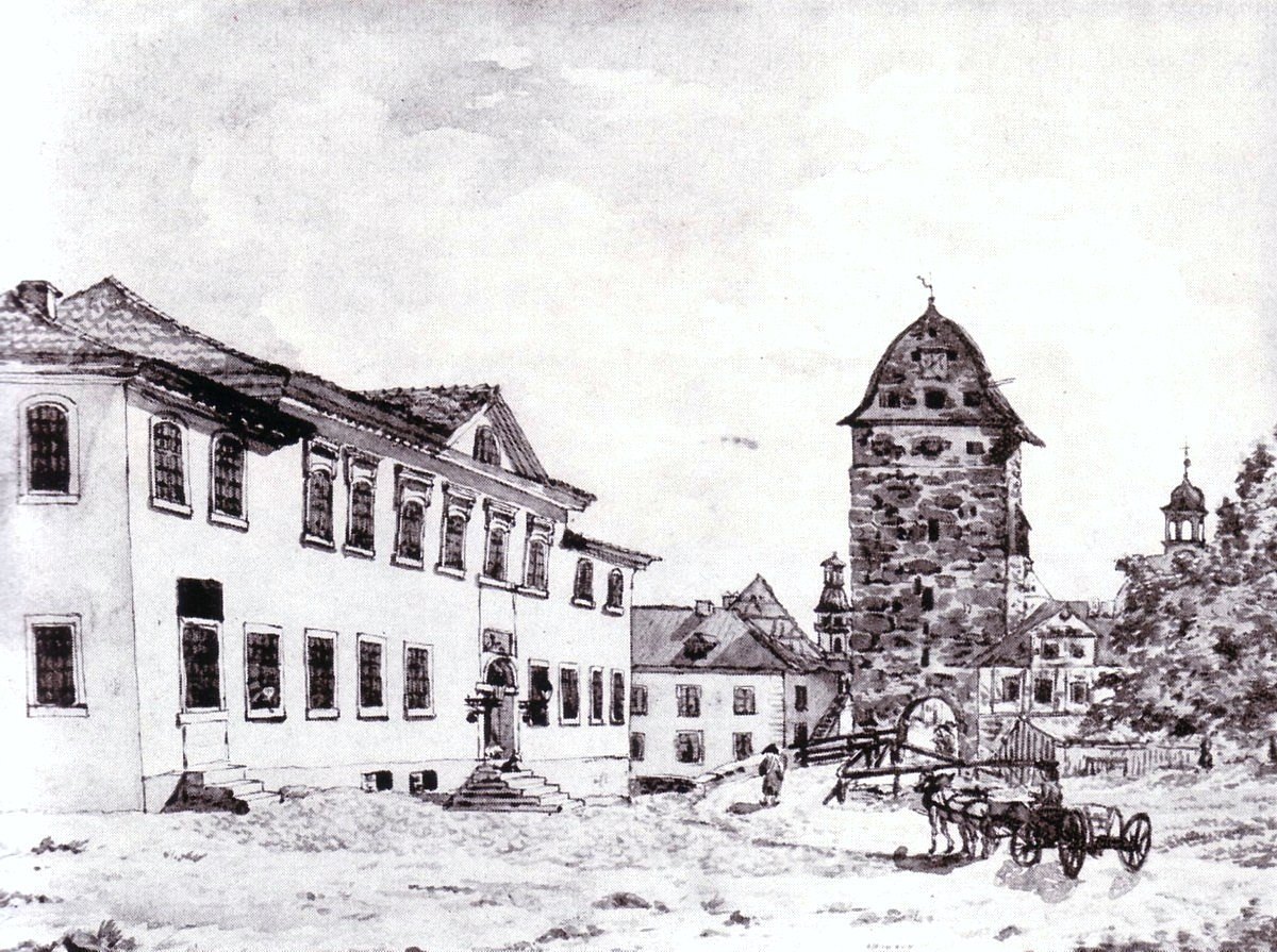 Das Hotel Sächsischer Hof in Meiningen kurz nach seiner Erbauung um 1810 (links), daneben der 1817 abgerissene Untere Torturm.